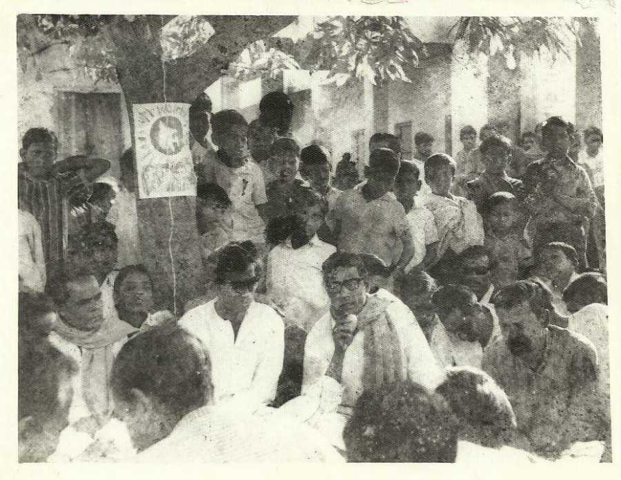 আলোচনারত জনাব সমাজী সাহেব।